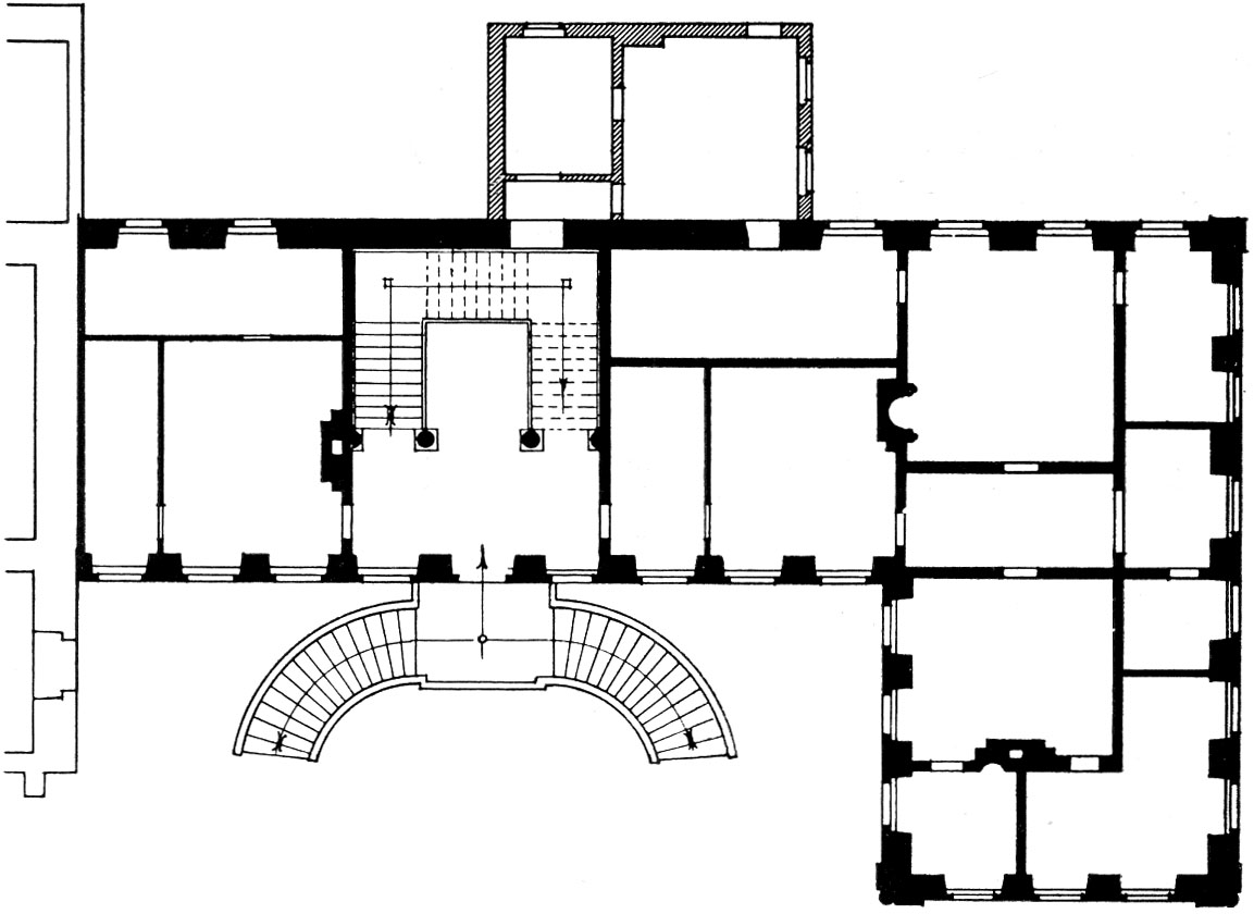 Grundriss der Abtei im Kloster Marienfeld, Erdgeschoss